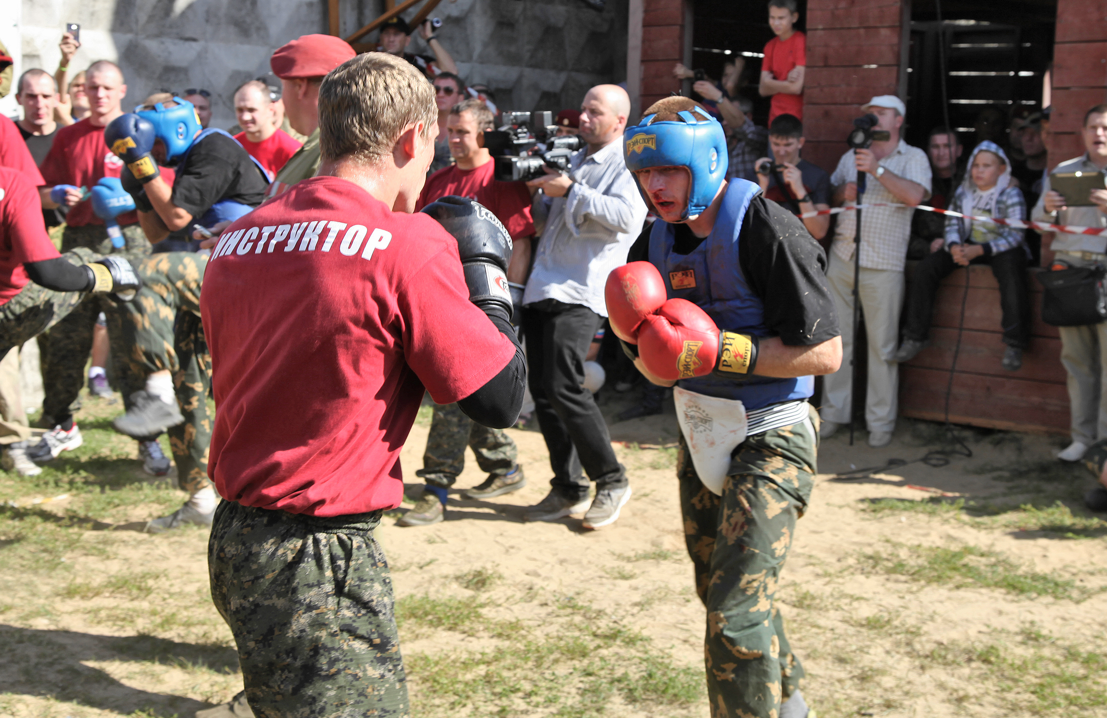 Учебный поединок в ходе испытаний на право ношение крапового берета